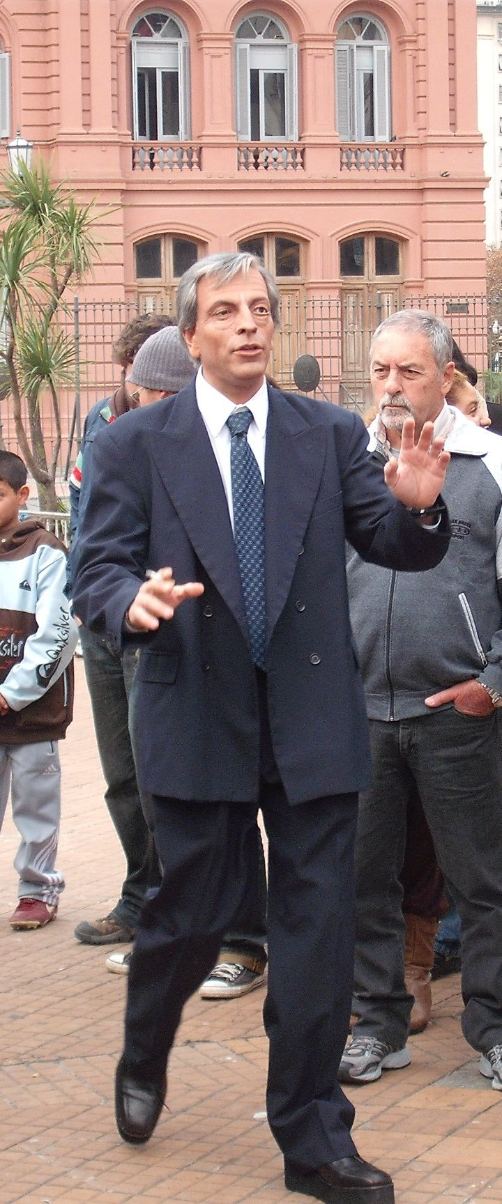 Fotografía del humorísta Freddy Villarreal, caracterizado como el ex-presidente Néstor Kirchner, para el programa de TV Showmatch. Al fondo se ve la Casa Rosada.